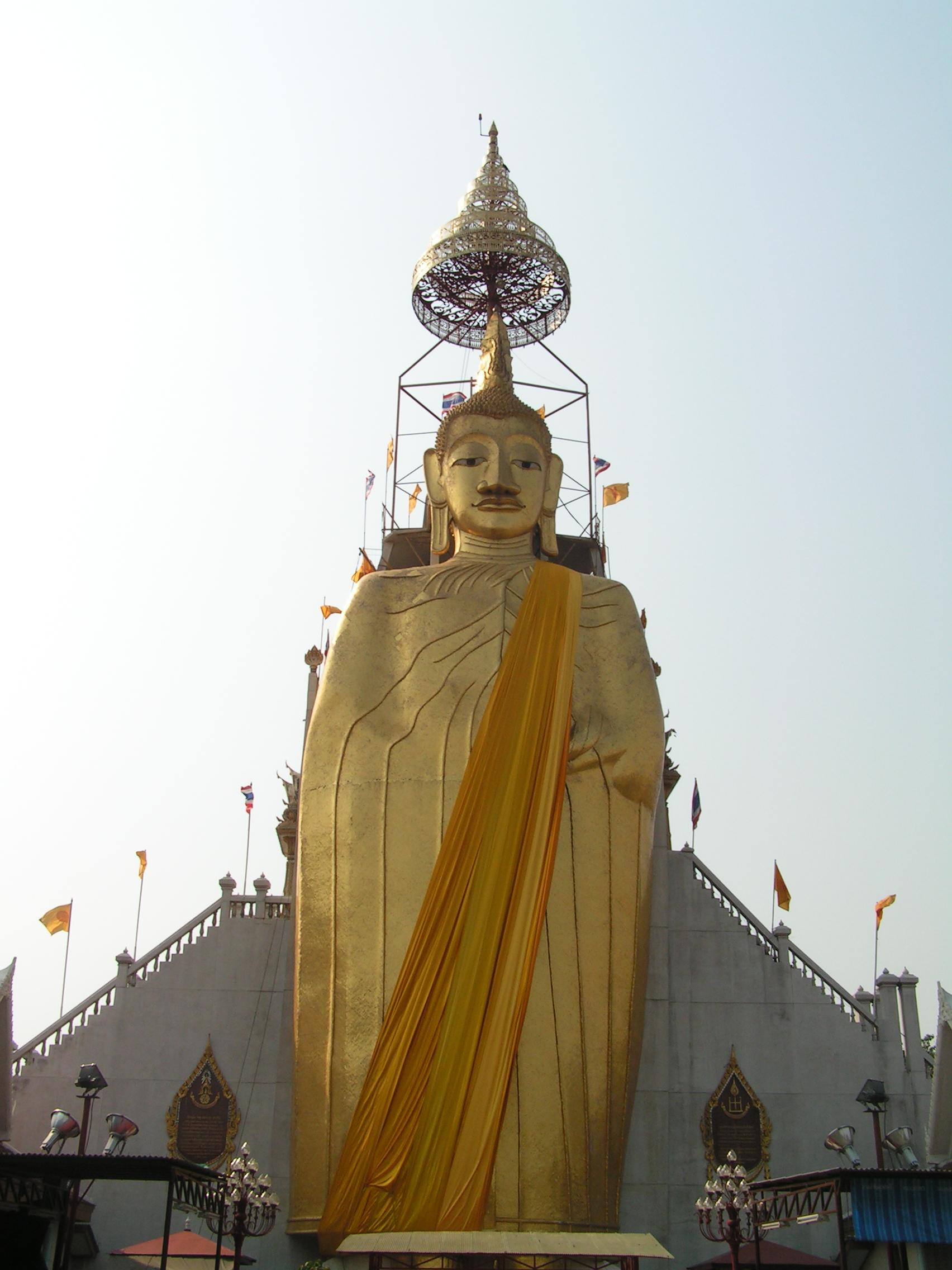 Standing buddha